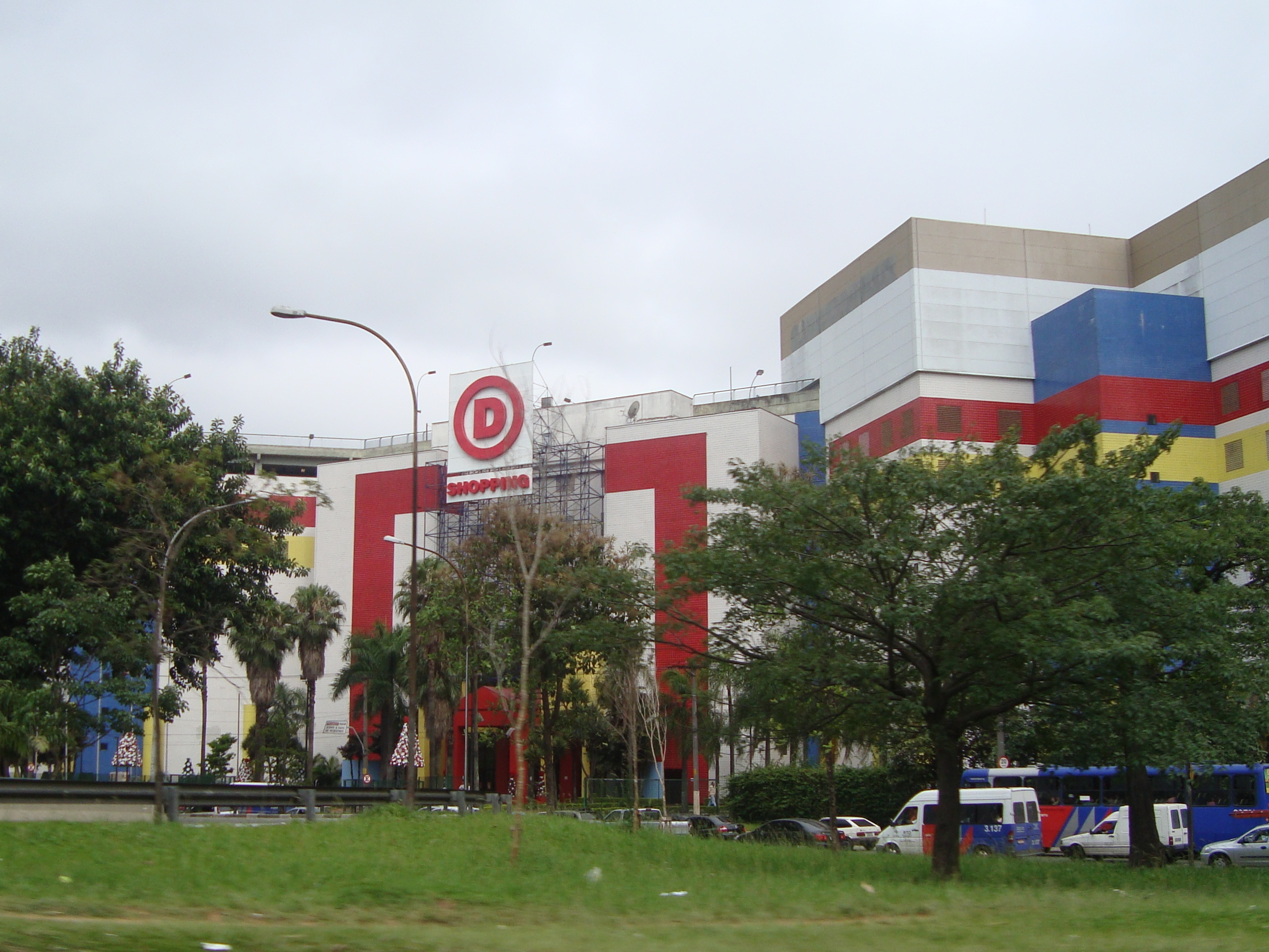 Foto do Shopping D no bairro do Canindé, zona central paulistana às márgens do rio Tietê.